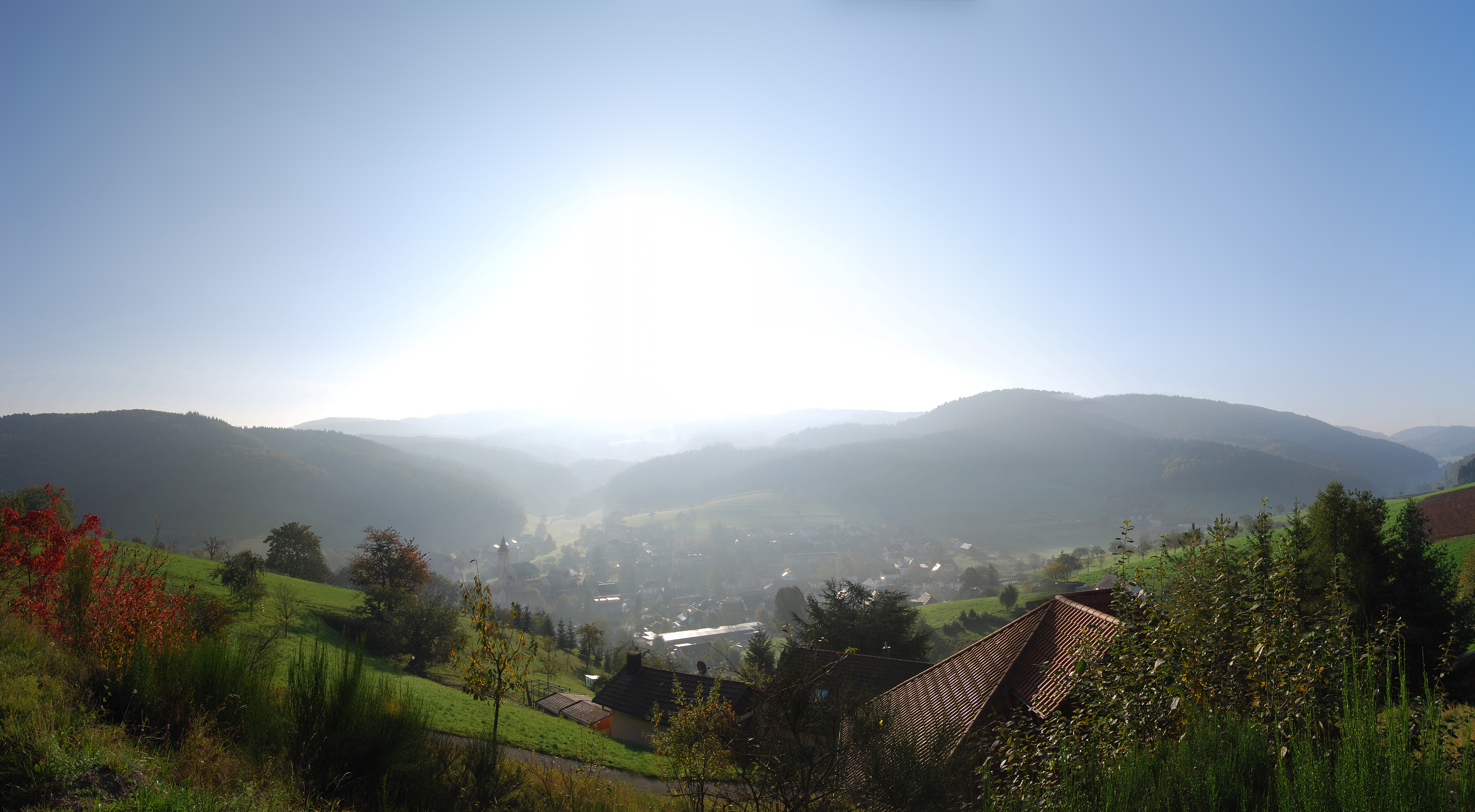 Dörlinbach